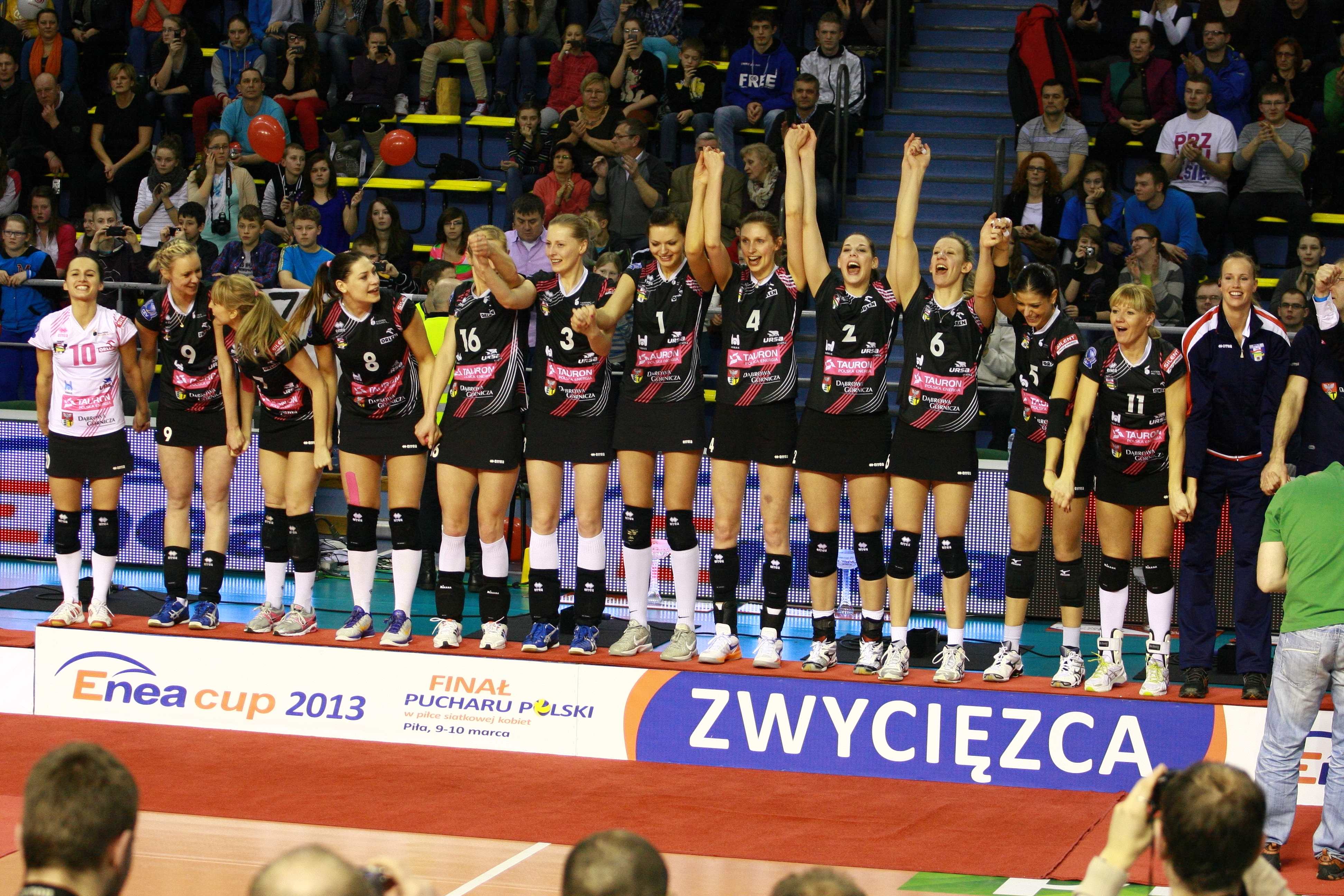 Atom Trefl Sopot Bank BPS Muszynianka Fakro Muszyna Tauron MKS Dąbrowa Górnicza Impel Gwardia Wrocław